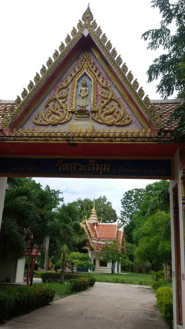 ประตูทางเข้าวัดสระสี่มุม